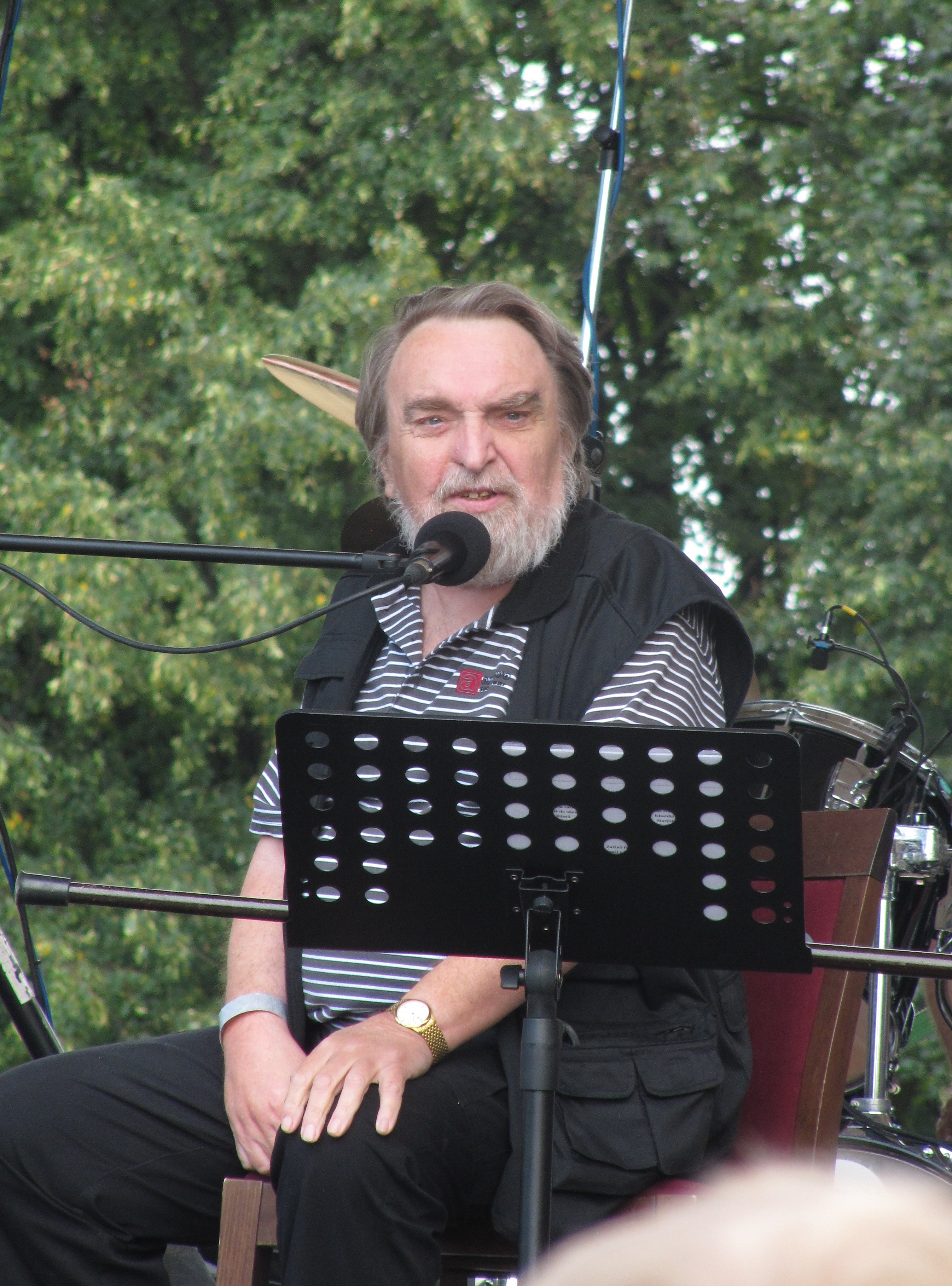 Jaroslav Wykrent v Holešově, srpen 2013